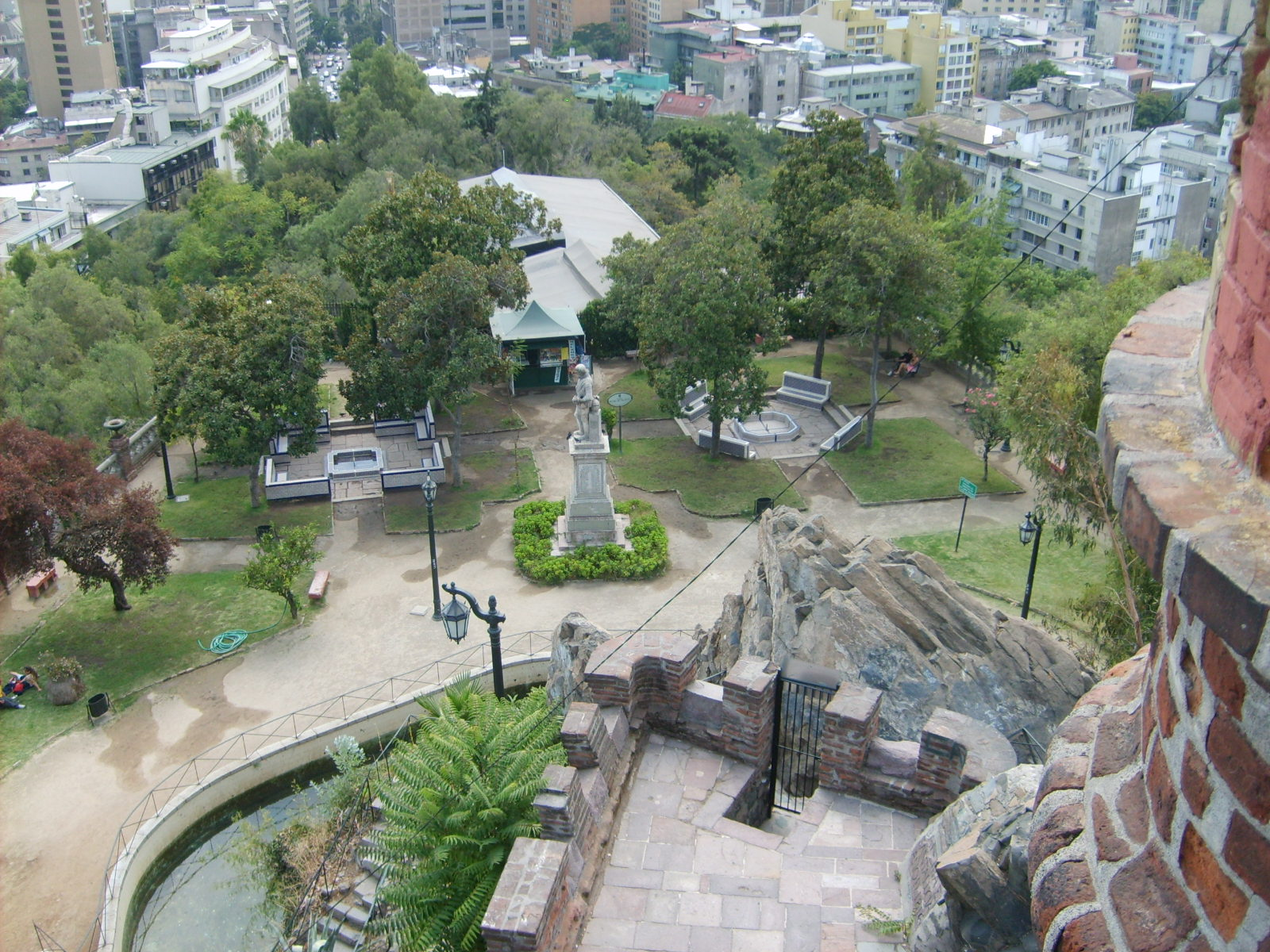 Vista Panorámica de la Plaza Pedro de Valdivia en el interior del cerro Santa Lucía.